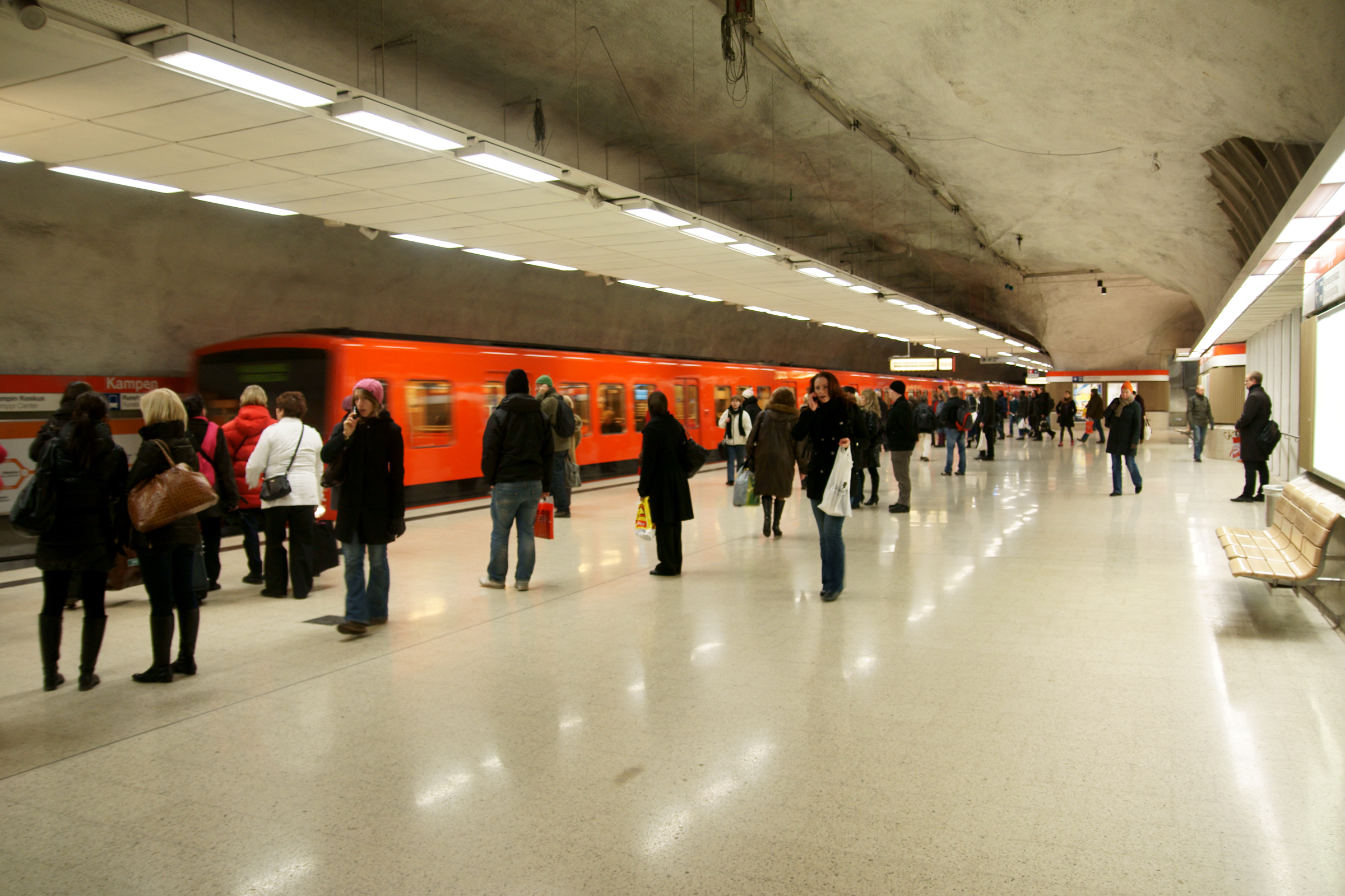 Kampin metroasemalle saapuu Vuosaarta kohti lähtevä metro.